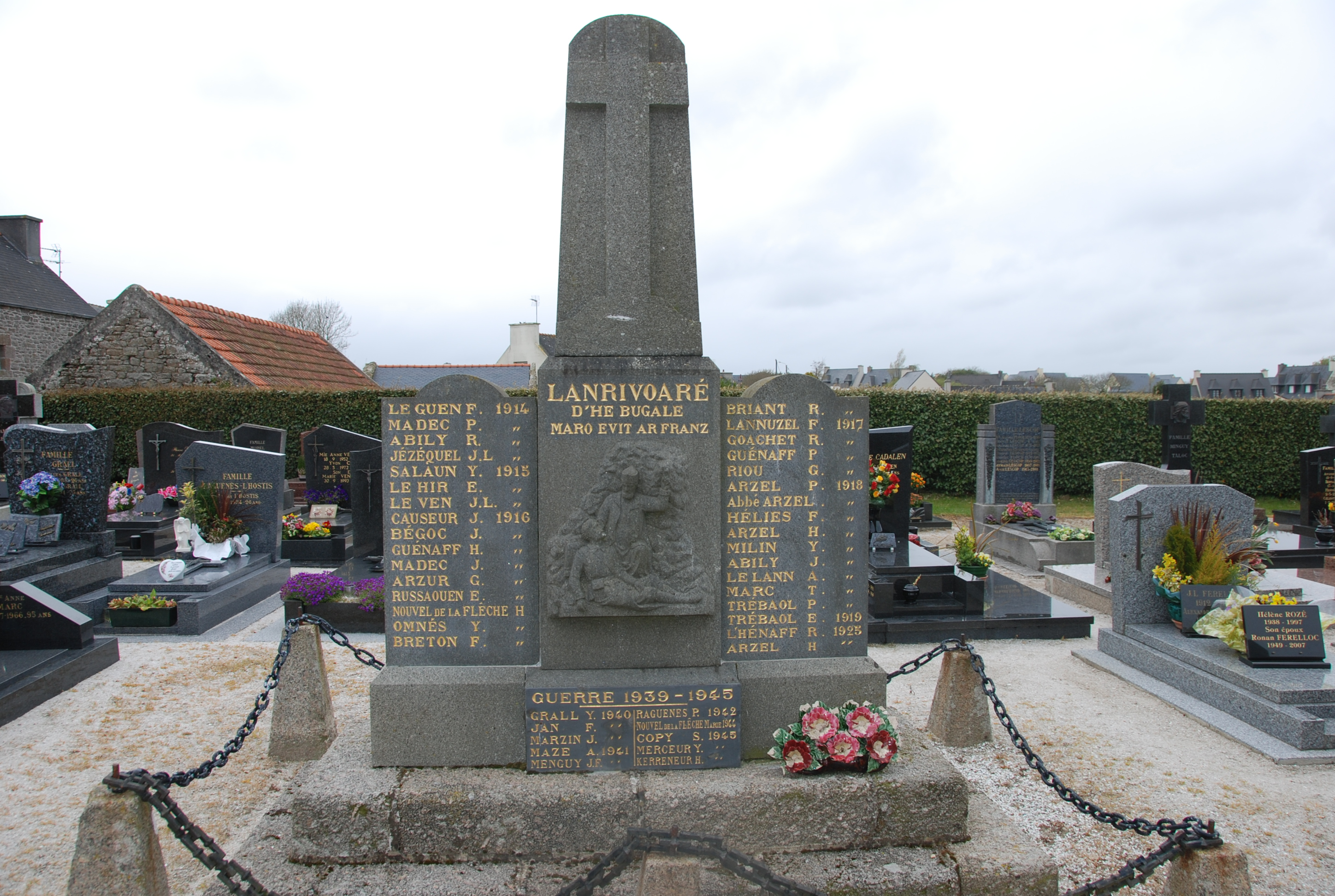 Monument aux morts - Lanrivoaré-29